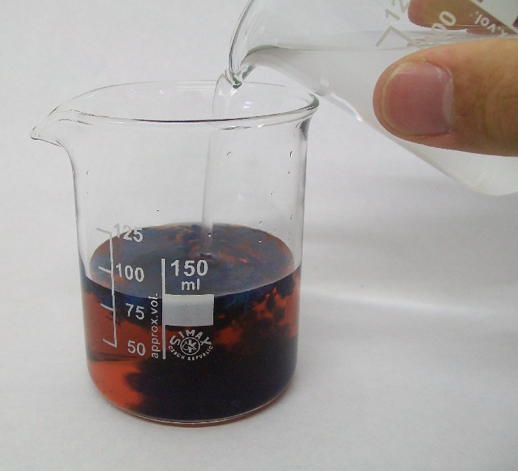 Neerslag van kobalt(II)hydroxide door toevoegen van NaOH aan kobalt(II)nitraat